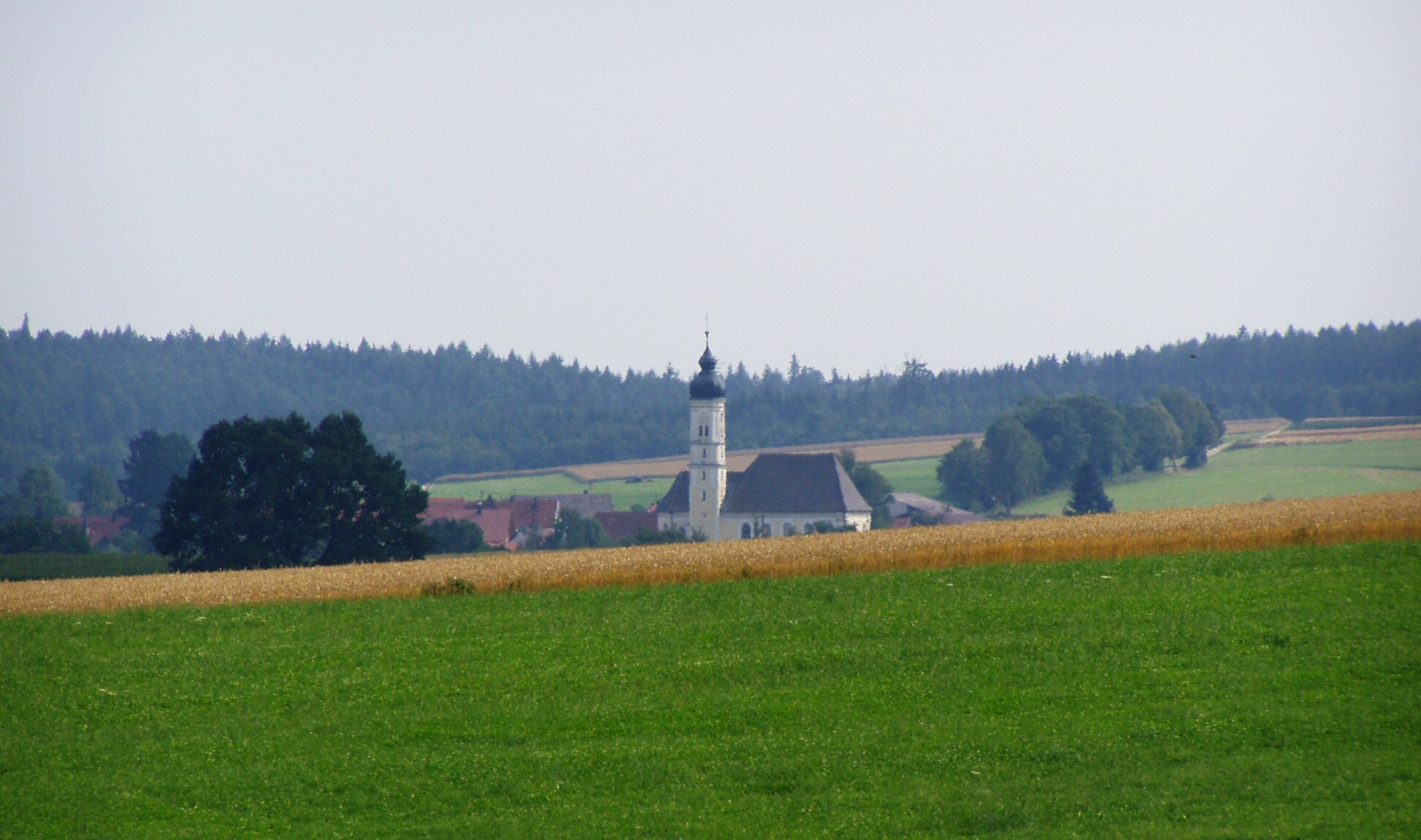 Ingstetten, Roggenburg